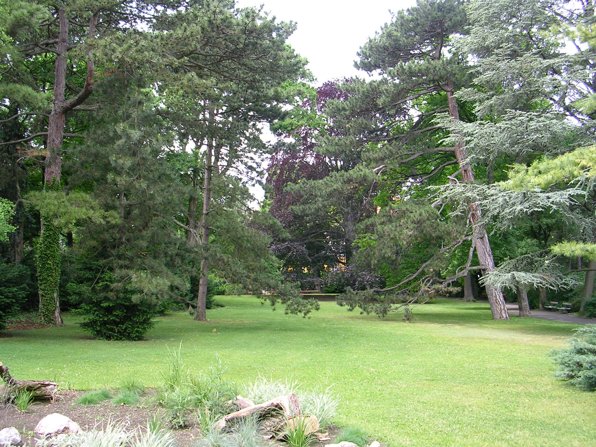 Wertheimstein Park in Döbling (Döbling)